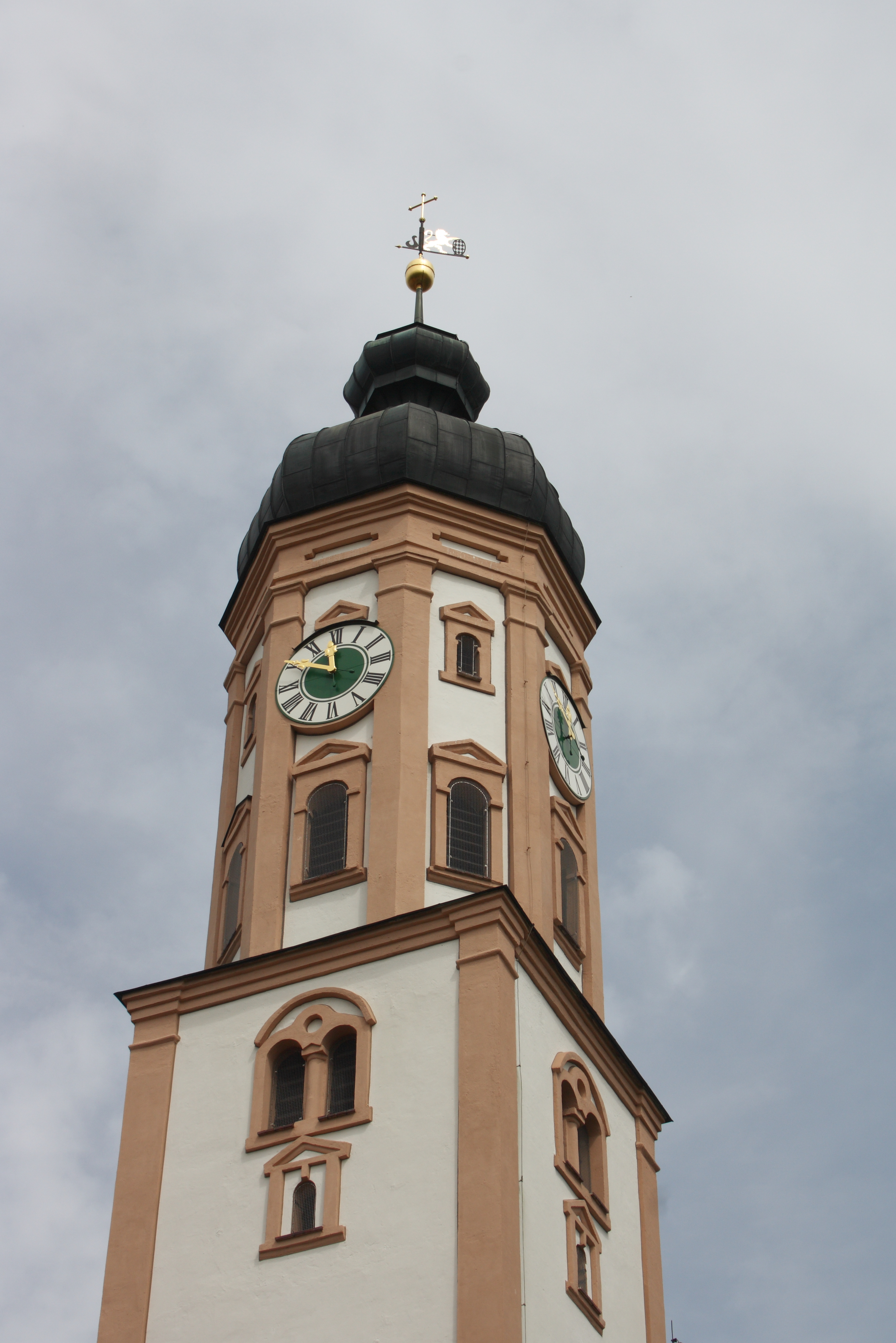 Katholische Pfarrkirche St. Martin in Horgau im Landkreis Augsburg (Bayern), Zwiebelturm